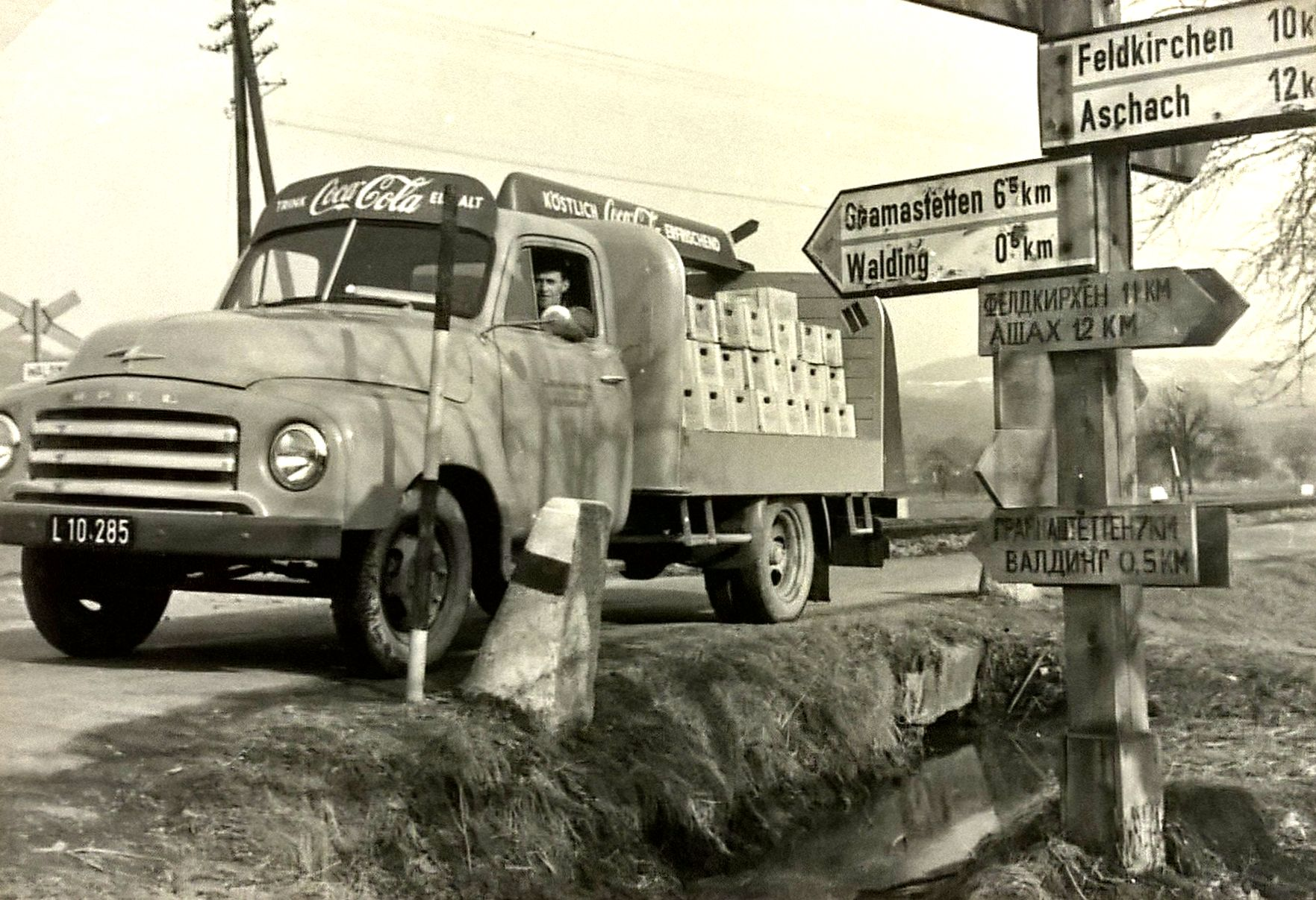 Peter Potye auf seiner 1. Auslieferungsfahrt für Coca Cola in die russische Besatzungszone ins Mühlviertel